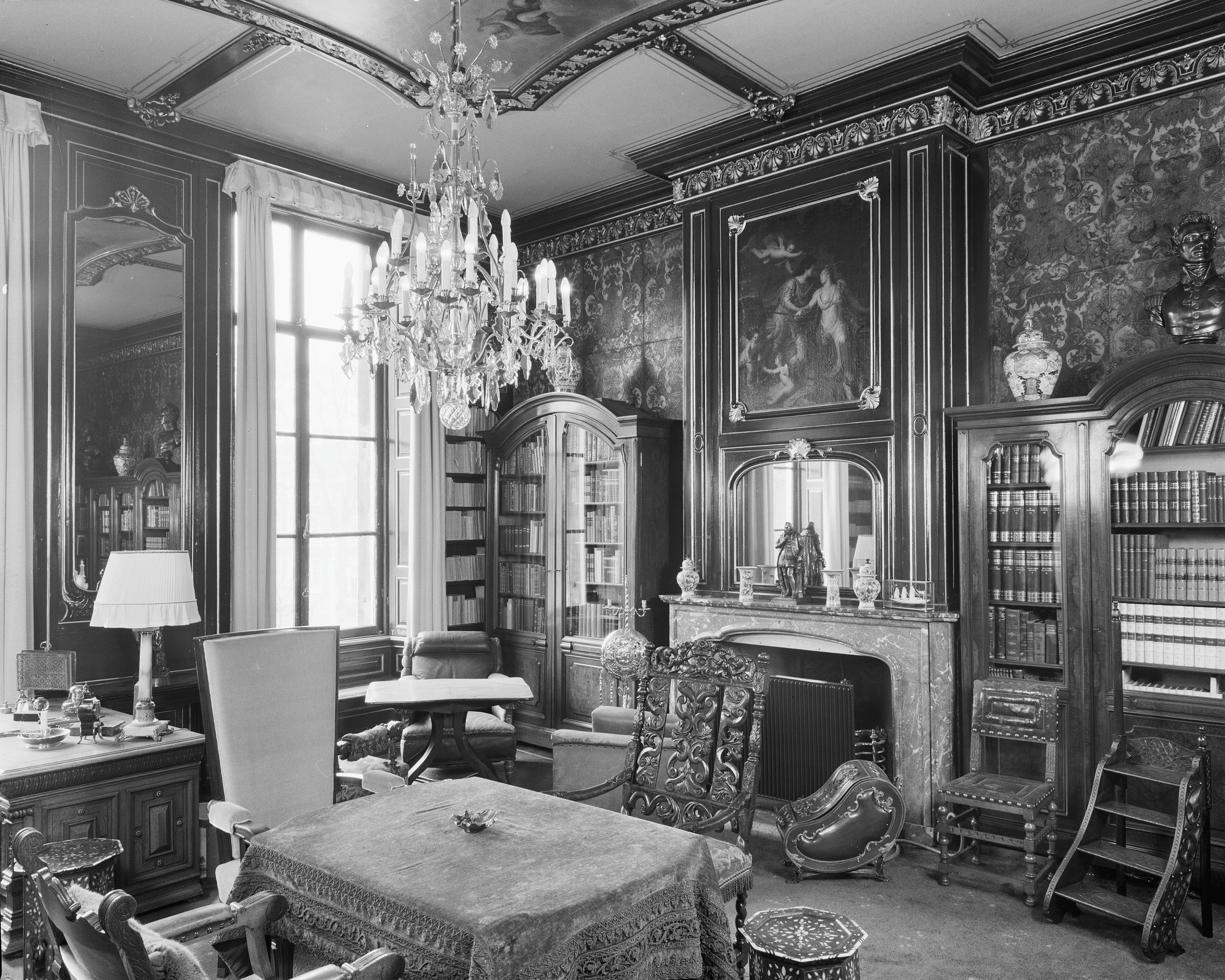 Paleis Kon.Moeder: linker voorkamer, middenverdieping